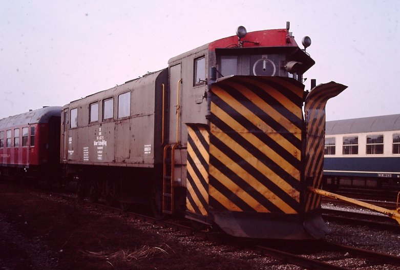 Aus E 36 02 umgebauter Klima-Schneepflug im Ausbesserungswerk Neuaubing 1986